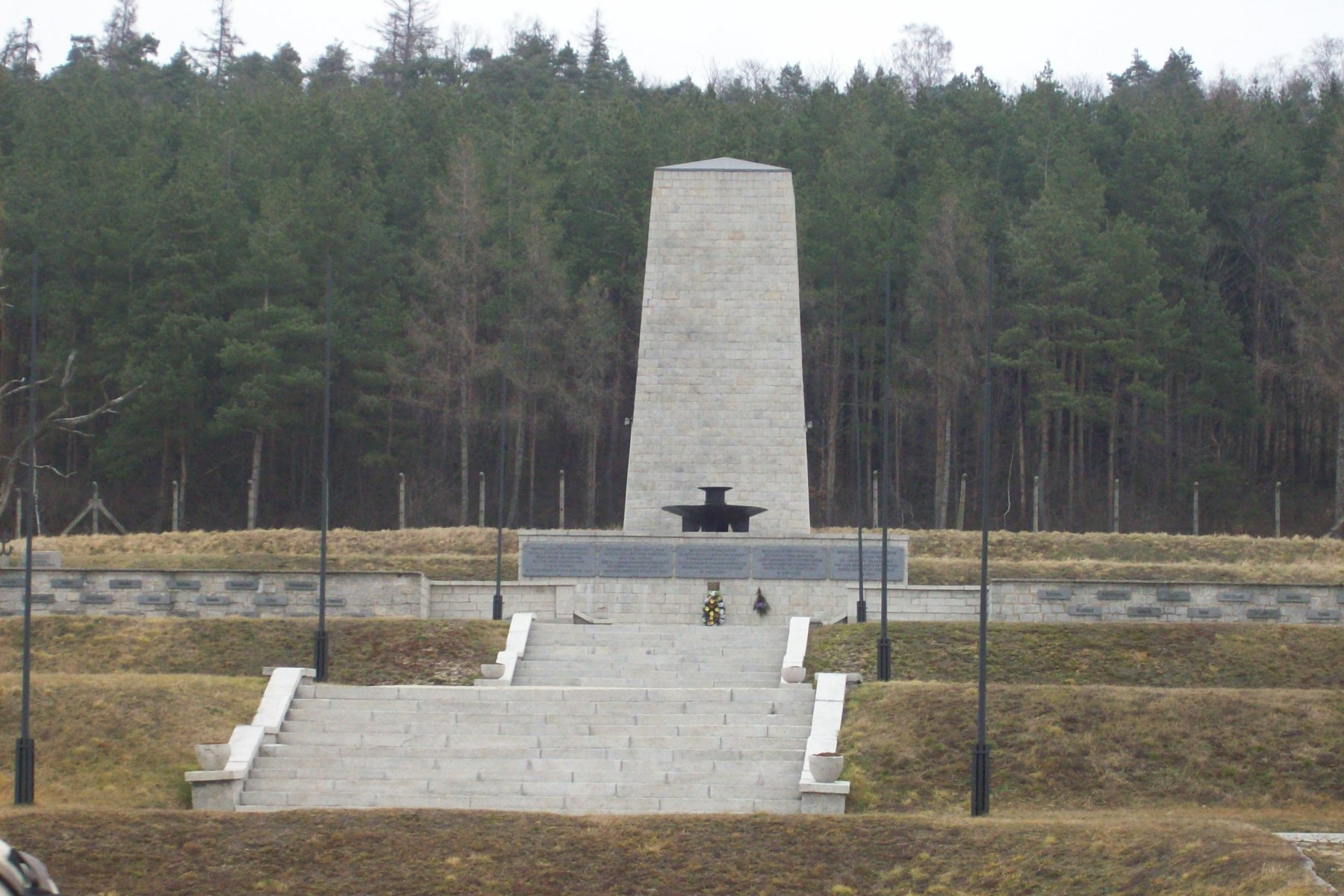 Pomnik znajdujący się na terenie byłego KL Gross-Rosen. Raz w roku odprawiana jest tu msza święta.